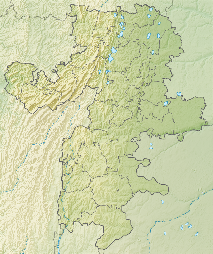 Физическая карта Челябинской области, на основе OpenStreetMap. Область: E57.00° / E63.50° / N51.90° / N56.43° Координаты для GMT: -R57.00/63.50/51.90/56.43 Инструменты: GMT, Inkscape